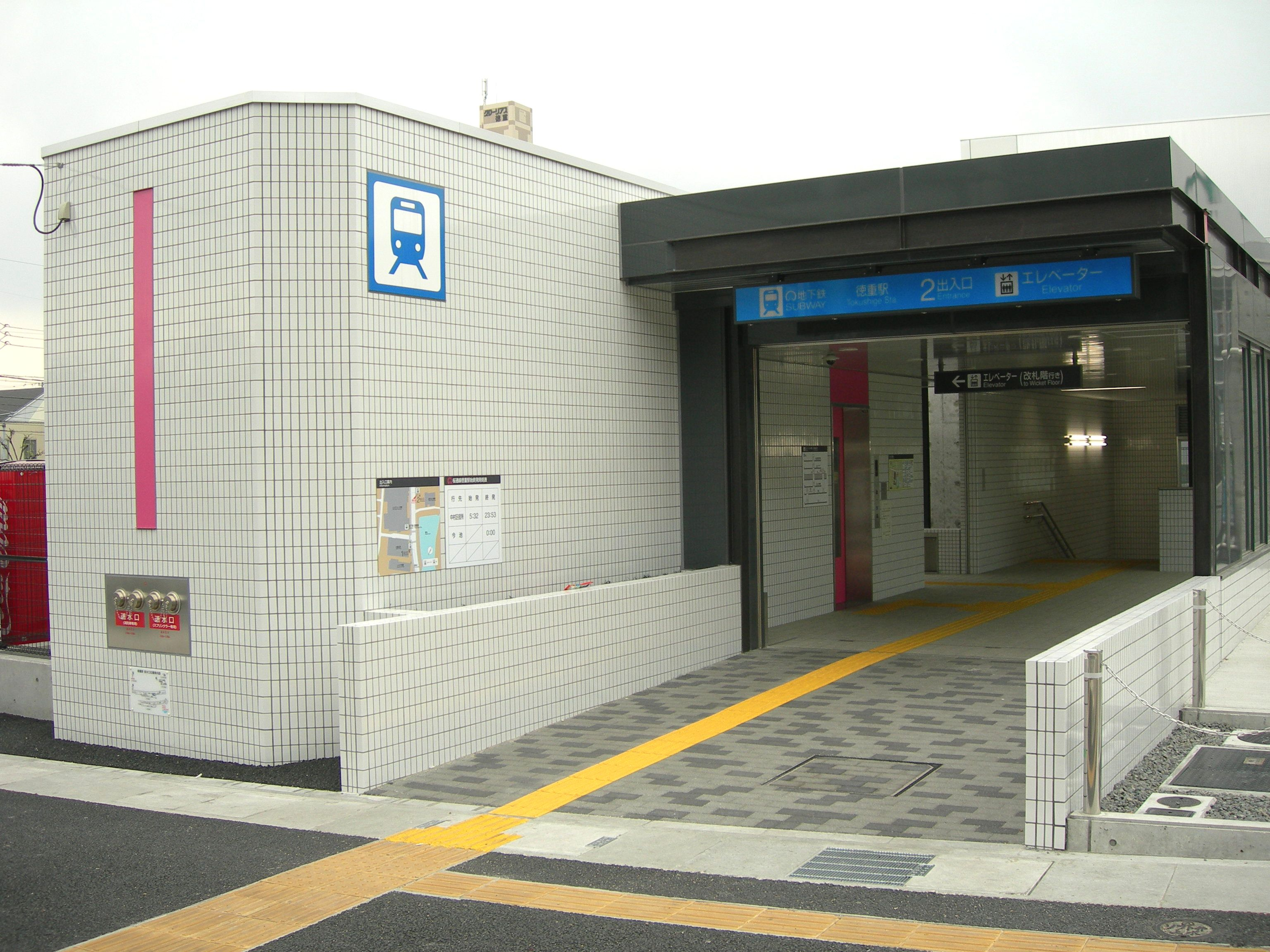 徳重駅2番出入口